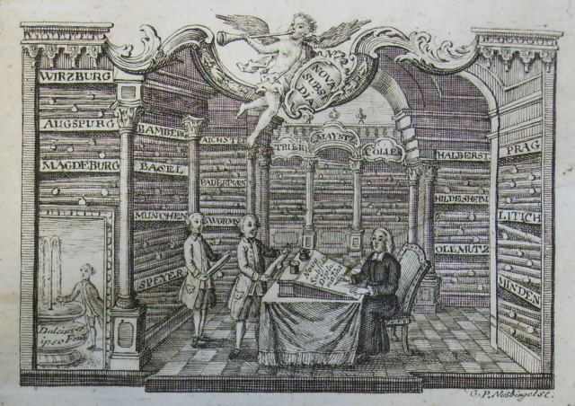 Stephan Alexander Würdtwein (1719-1796), Weihbischof von Worms und Historiker, in seinem Urkundenarchiv. (Stich)